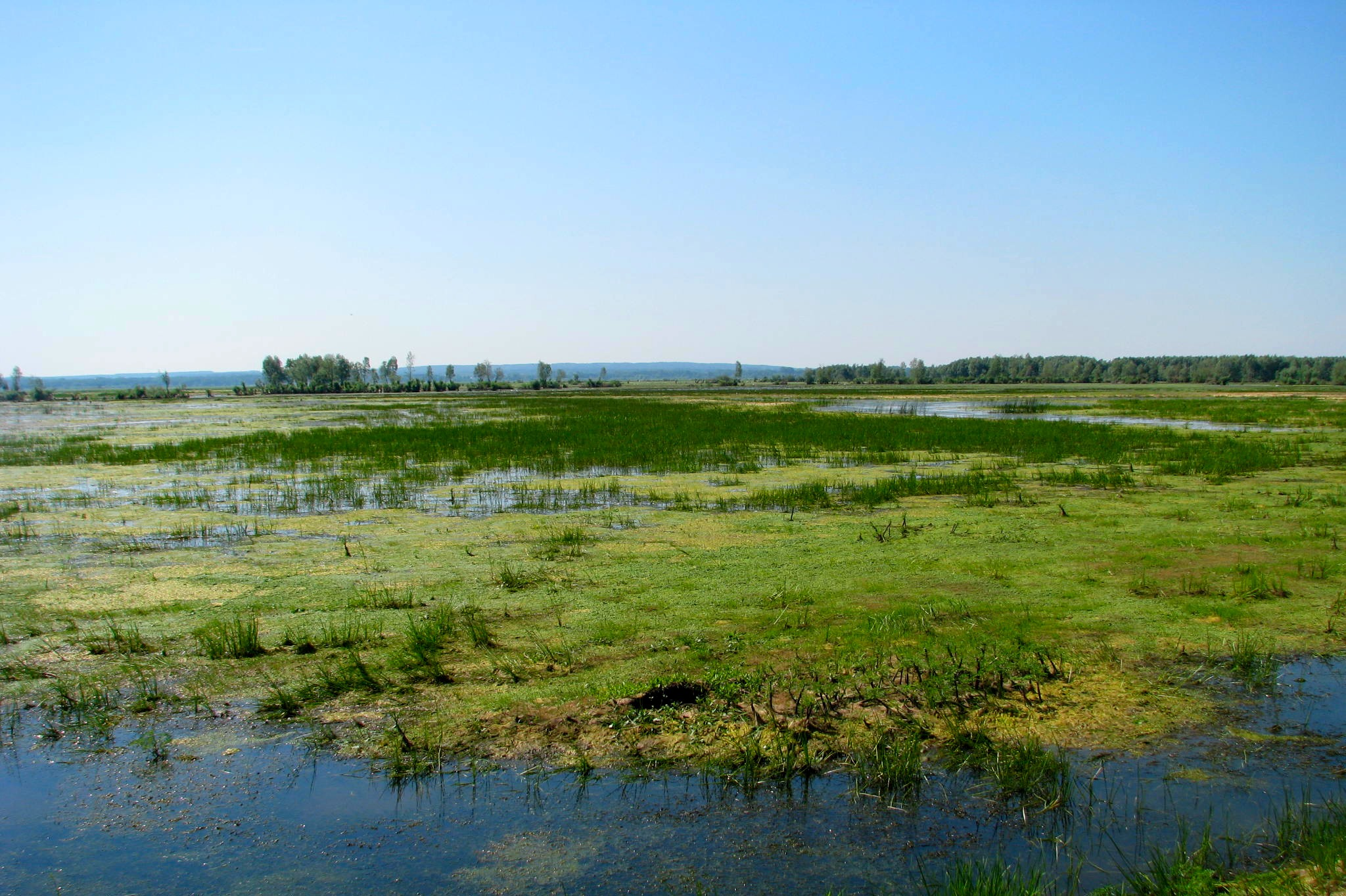 Specjalny obszar ochrony siedlisk Ujście Warty. This is a photography of Natura 2000 protected area with ID PLC080001